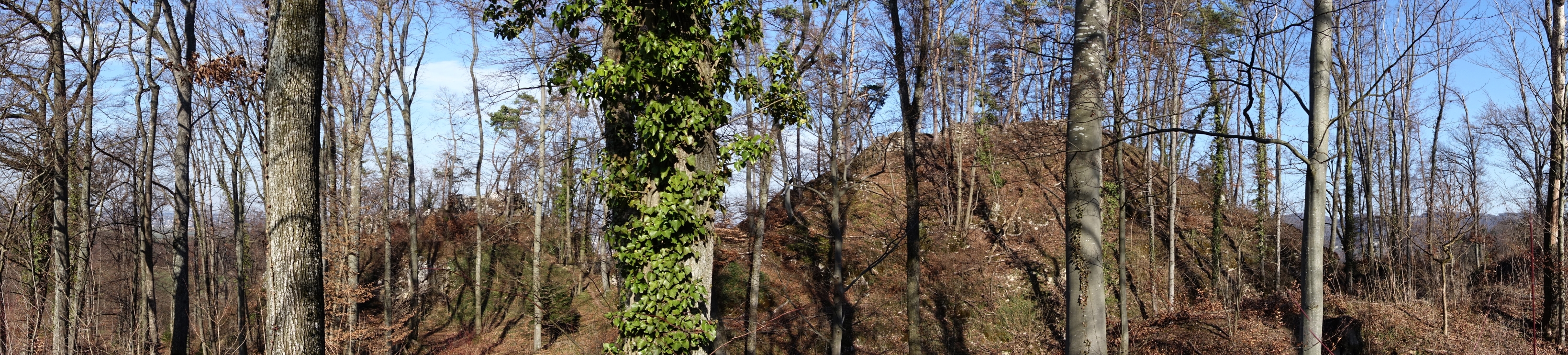 Ruine Münchsberg, Aesch, Basel Land, Schweiz